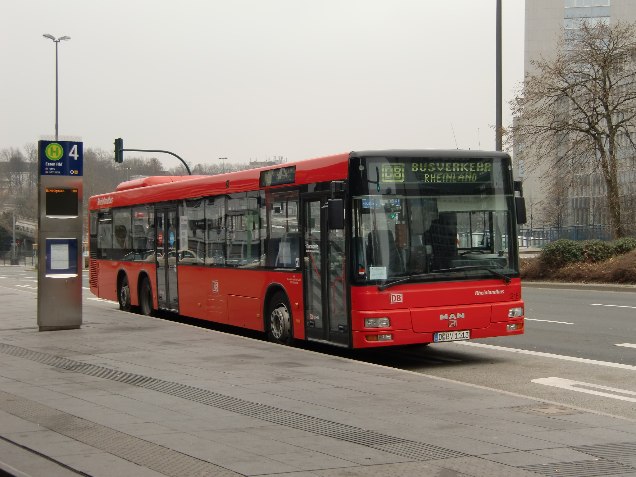 Bus von DB Busverkehr Rheinland am Hauptbahnhof Essen